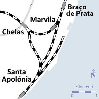 Triângulo de Xabregas, parte da malha ferroviária de Portugal.